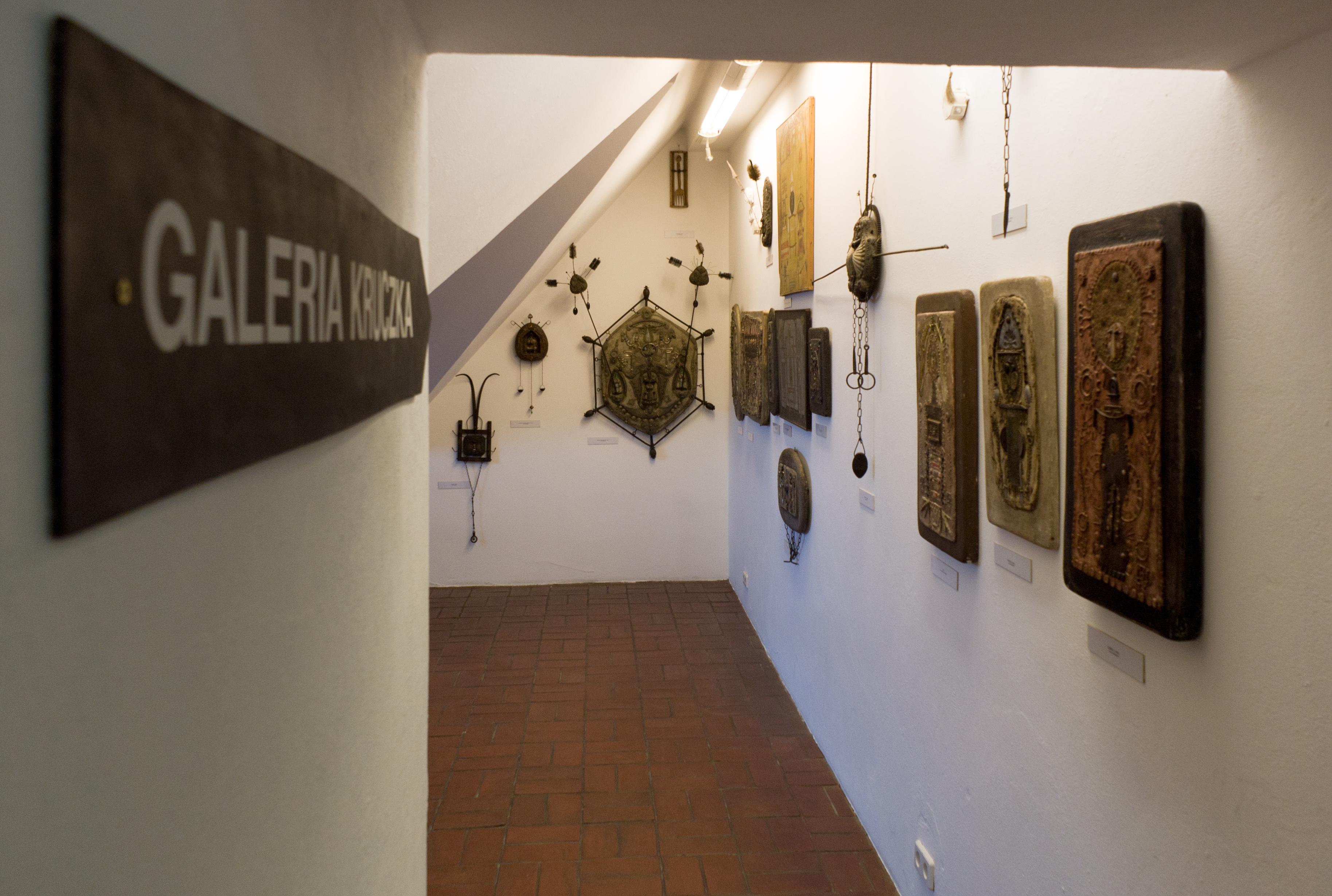 Wejście do galerii Mariana Kruczka w Muzeum Historycznym w Sanoku